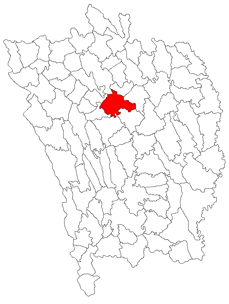 Categorie:Hărţi ale judeţului Vaslui